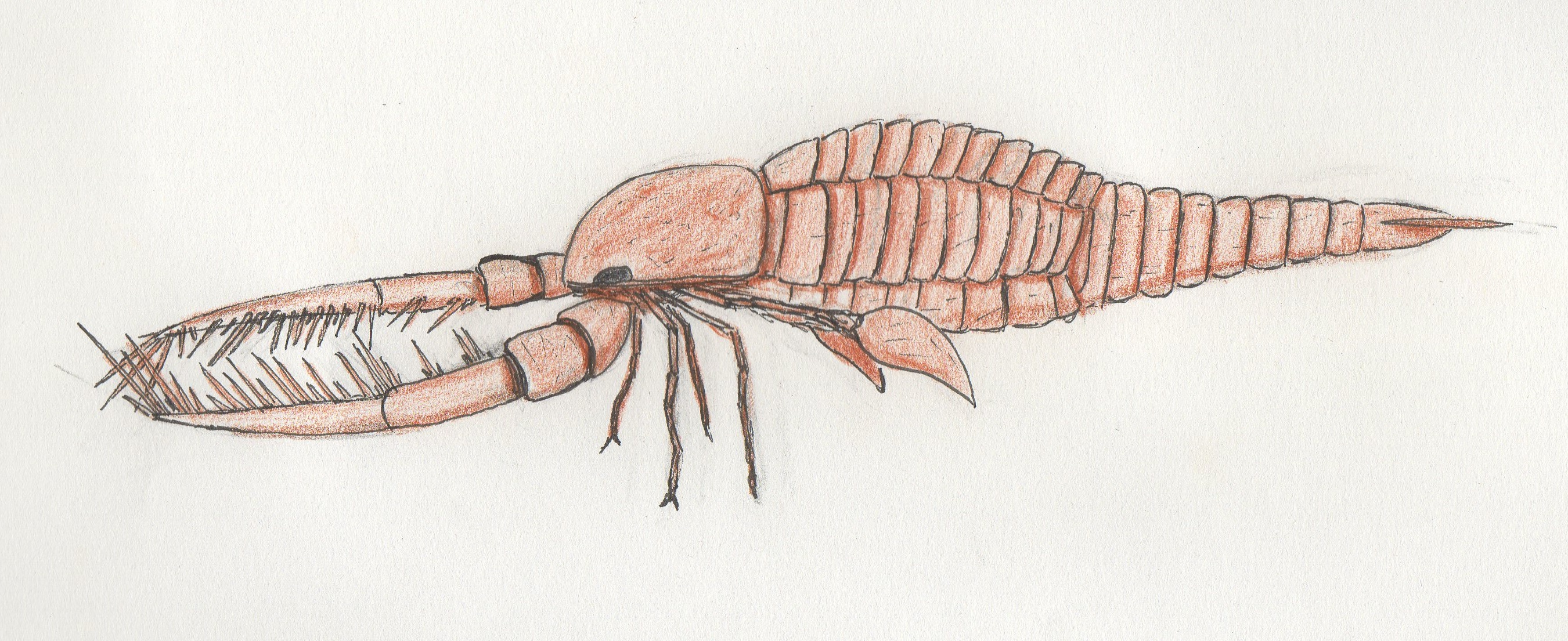 Reconstitution de Megalograptus